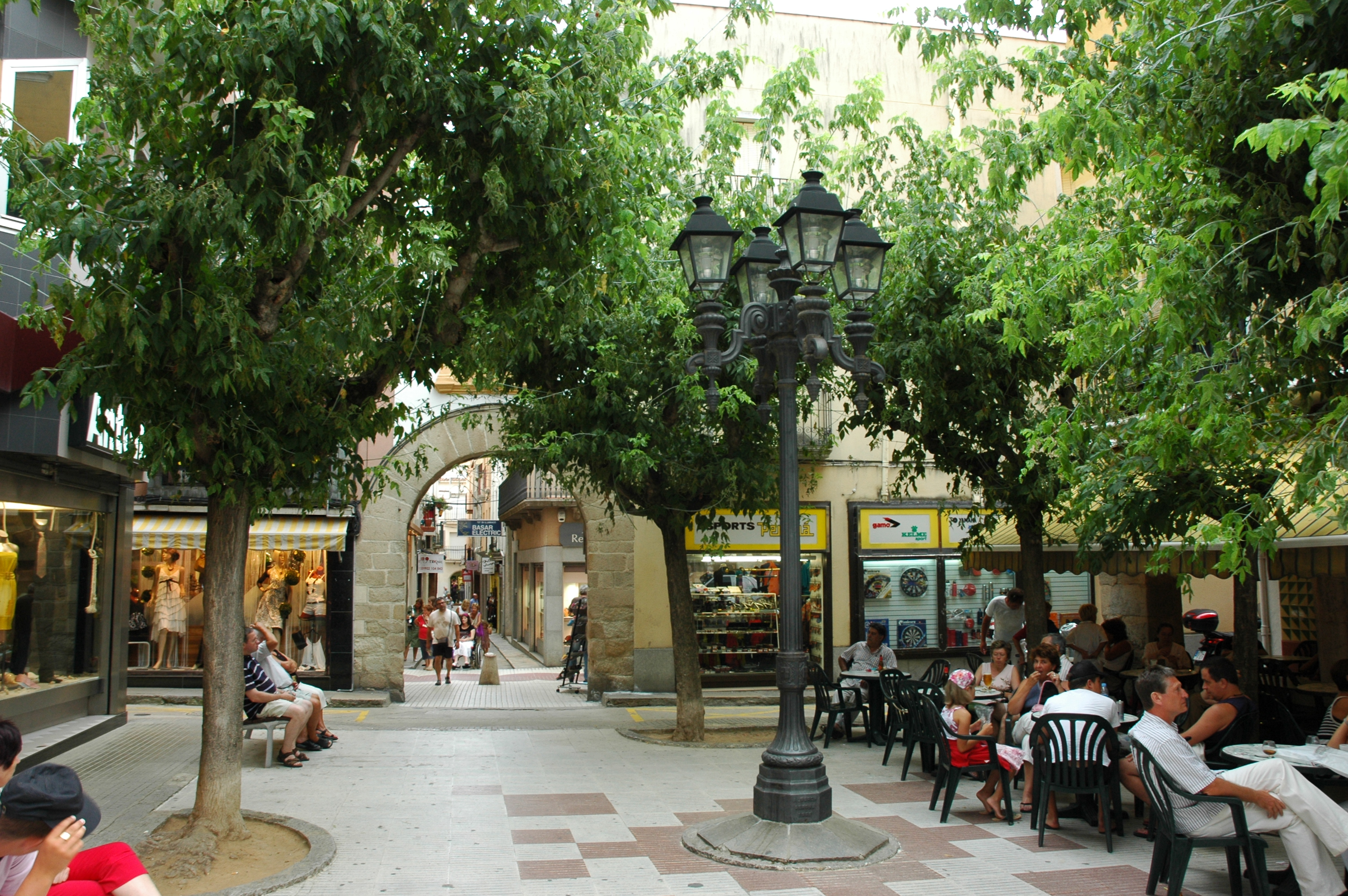 Blanes - Plaça Verge Maria de Blanes